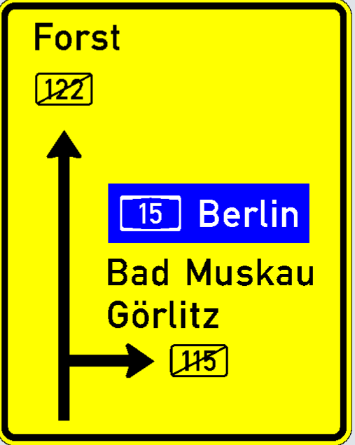 So sah der Wegweiser bis 2005 bei Cottbus aus, nachdem es abgestuft wurde.